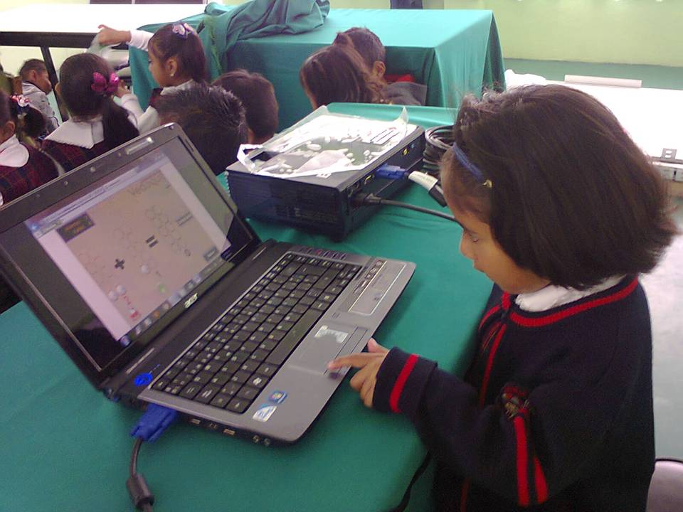 El ordenador es utilizado por la alumna